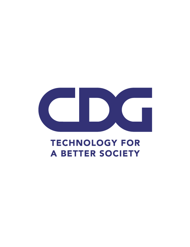 CDG logo